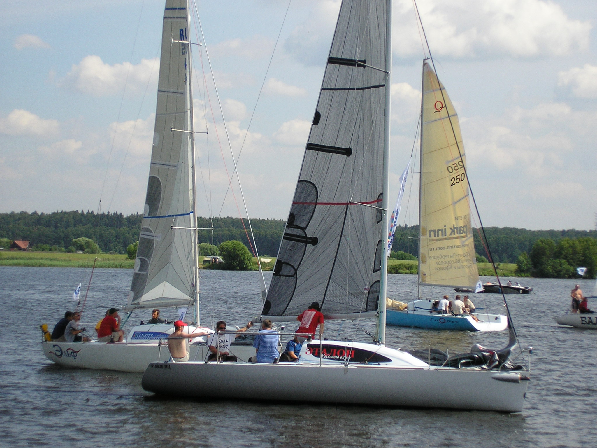 Open800 Class Boats